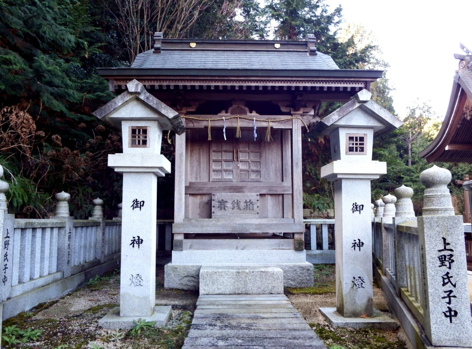 粟井神社 杉尾社